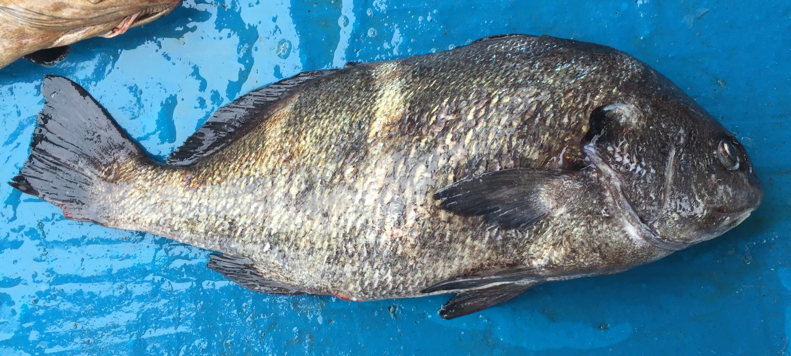 Ejemplar de chita (Anisotremus scapularis) en el puerto de Ancón (Perú)